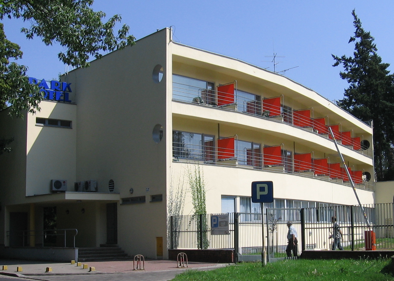 Haus 31 (Ledigenwohnheim) der Werkbund-Siedlung in Breslau / Wroclaw; erbaut 1927 nach Entwurf des Architekten Hans Scharoun